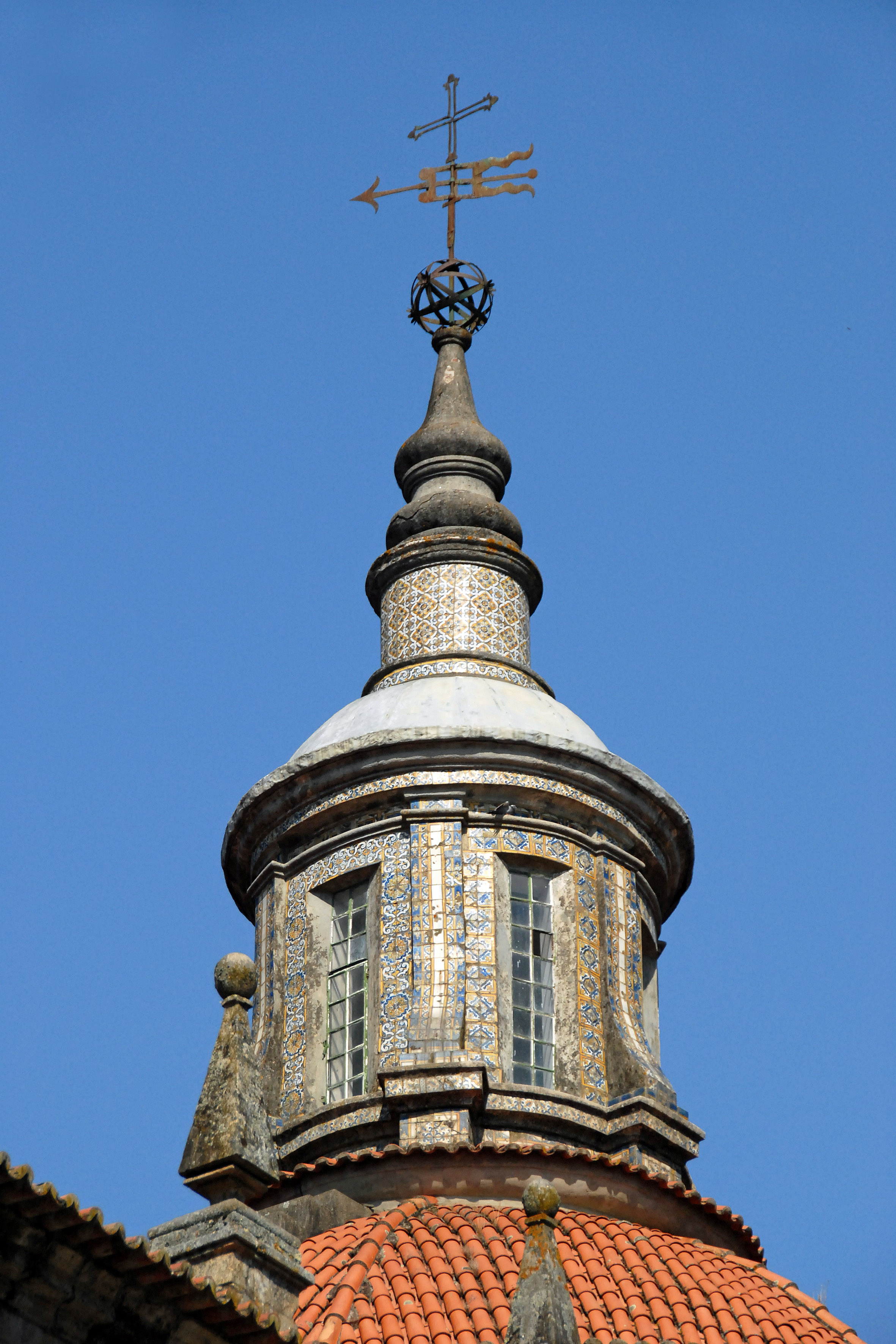 Igreja de São Gonçalo de Amarante This file was uploaded for Wiki Loves Monuments in Portugal with the unique identifier 70623.